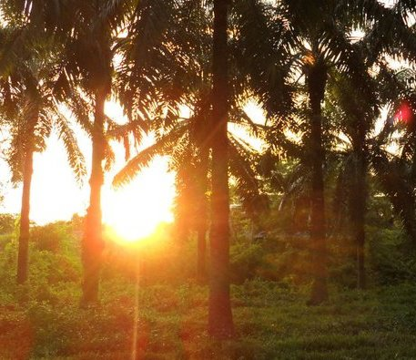 The African Palm Tree Forest